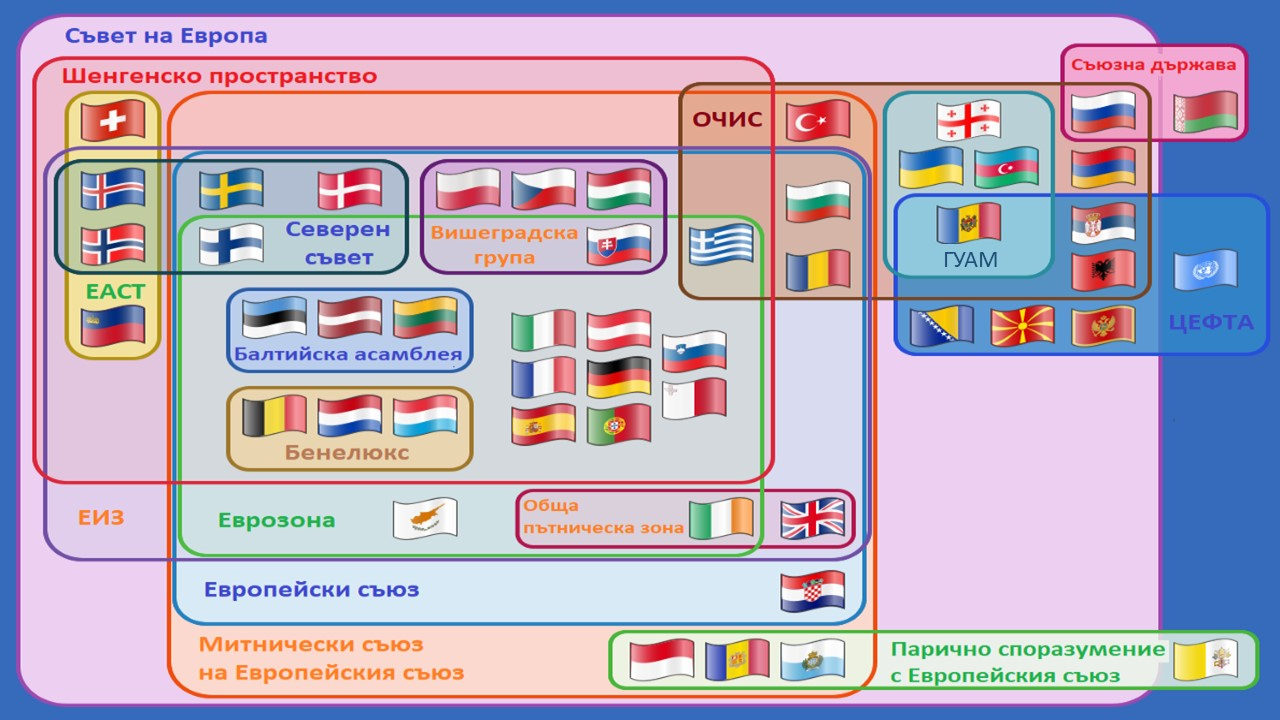 Връзките между различните европейските организации и държави членки.